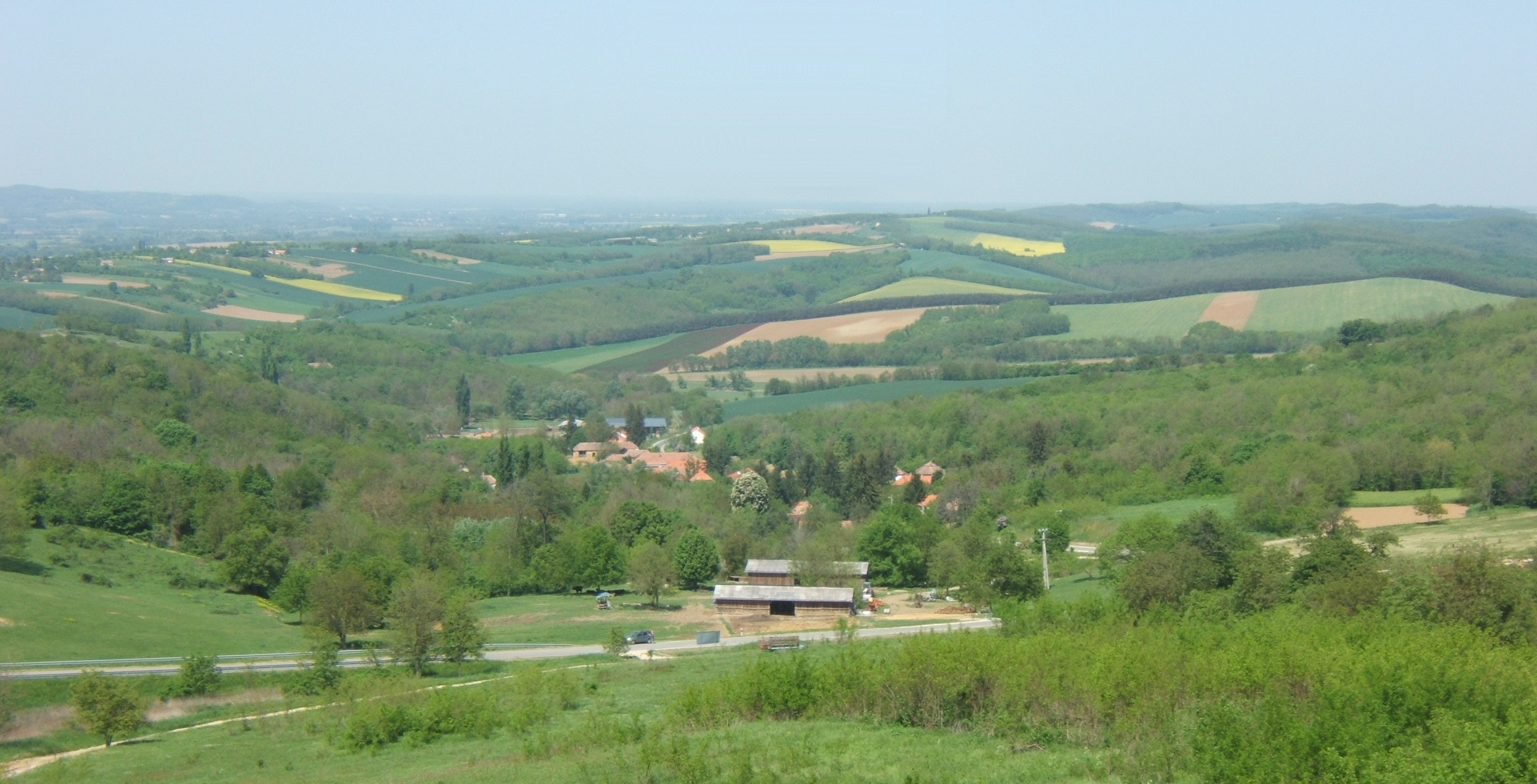 Zalaköveskút látképe